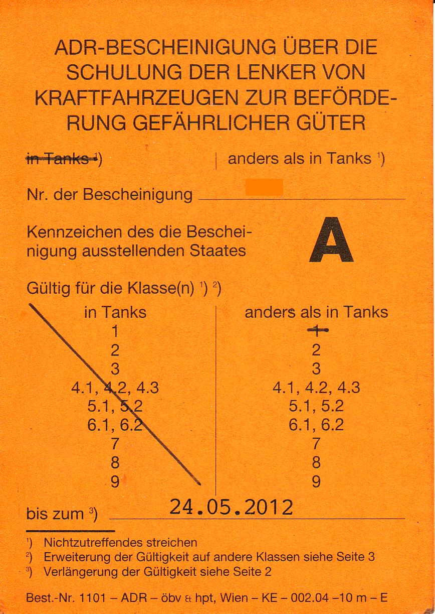 Gültige ADR-Bescheinigung in Österreich für alle Klassen außer Tankwagen ausgestellt